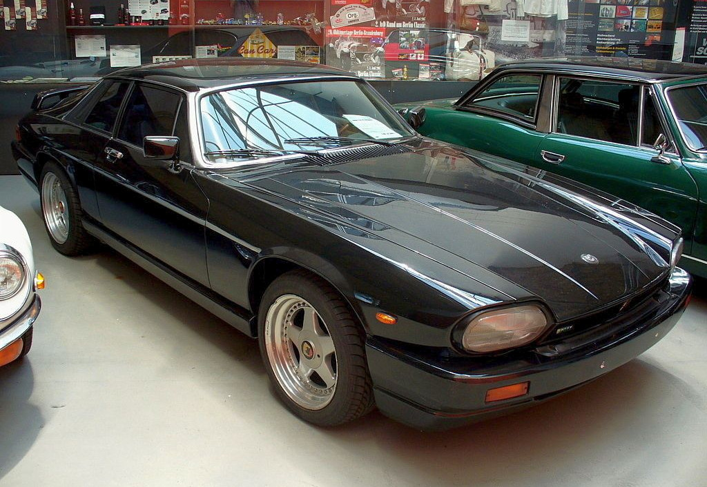 Jaguar XJ-S